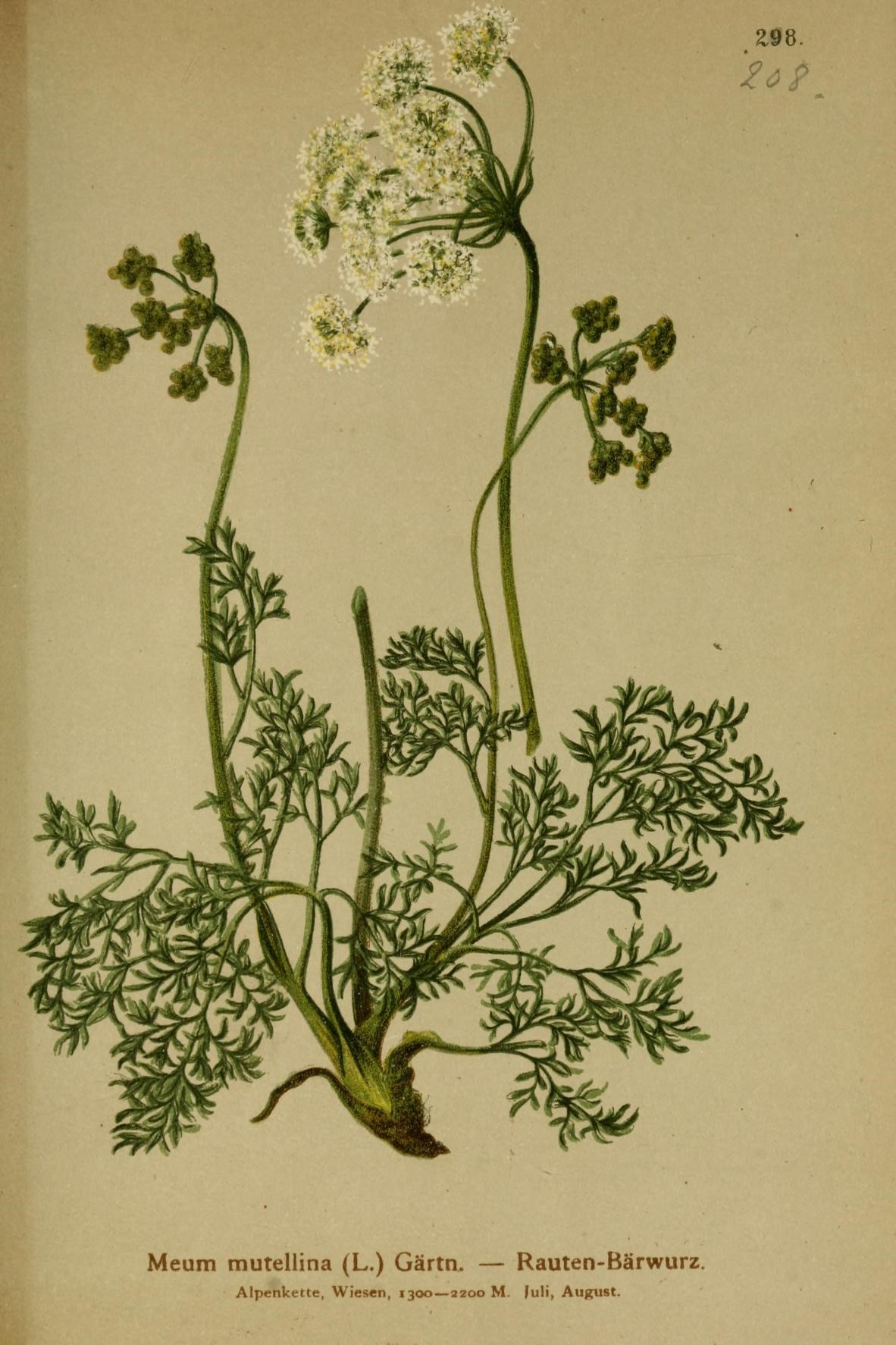 Meum mutellina (L.) Gärtn. — Rauten-Bärwurz. Alpenkette, Wiesen, 1300—3200 M. fuli, Auj?ust.